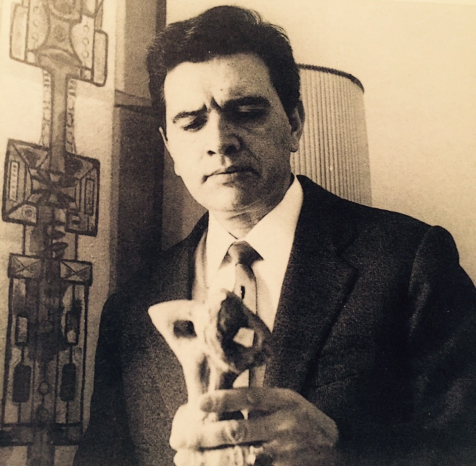 Lino Paolo Suppressa